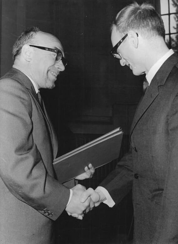 Zentralbild-Franke 10.5.1967 Berlin: Heinrich-Mann-Preis I. Klasse für Hermann Kant. Hermann Kant (rechts), der Autor des Romans "Die Aula", nahm am 10.5.1967 den Heinrich-Mann-Preis 1967 I. Klasse aus den Händen von Eduard Claudius (links), amtierender Präsident der Deutschen Akademie der Künste zu Berlin, entgegen.